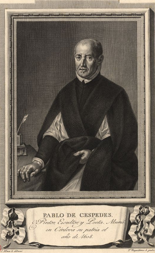 Retrato de Pablo de Céspedes (c.1538-1608)